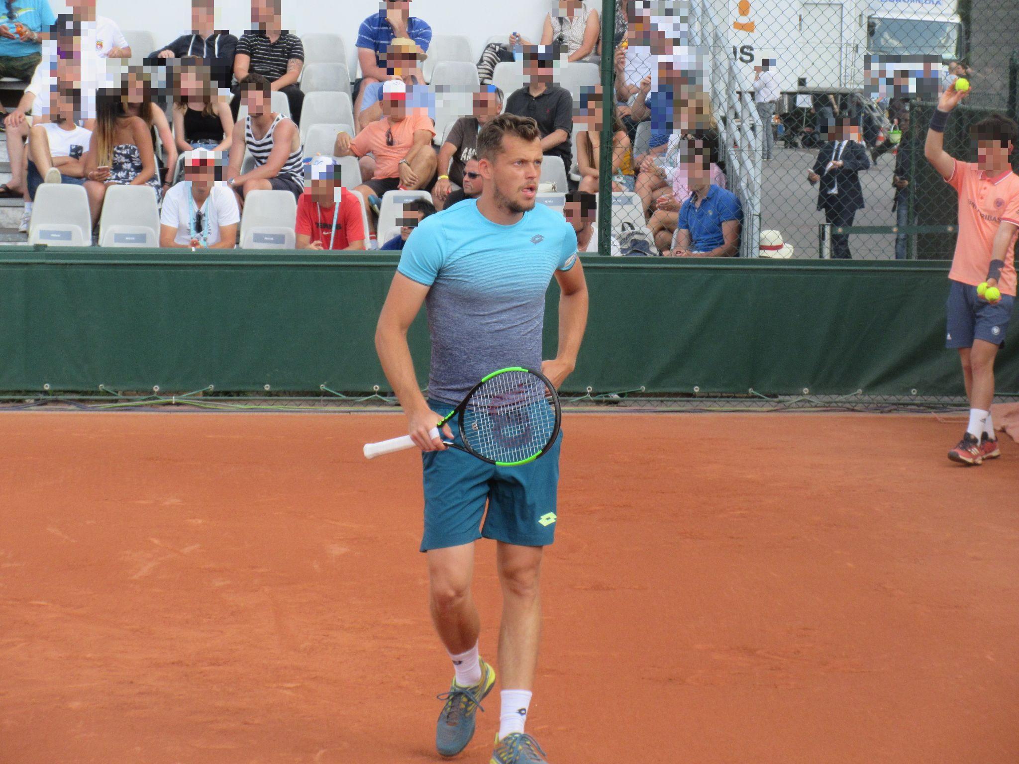 Adam Pavlásek à Roland-Garros en 2018